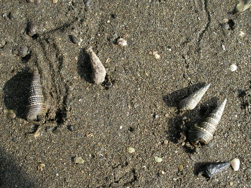 砂上のウミニナ類。左からヘナタリ、ウミニナ、ホソウミニナ、ヘナタリ、ホソウミニナ死殻。長崎市にて( Left to right Pirenella nipponica, Batillaria multiformis, B. cumingii, Nagasaki, Japan.)